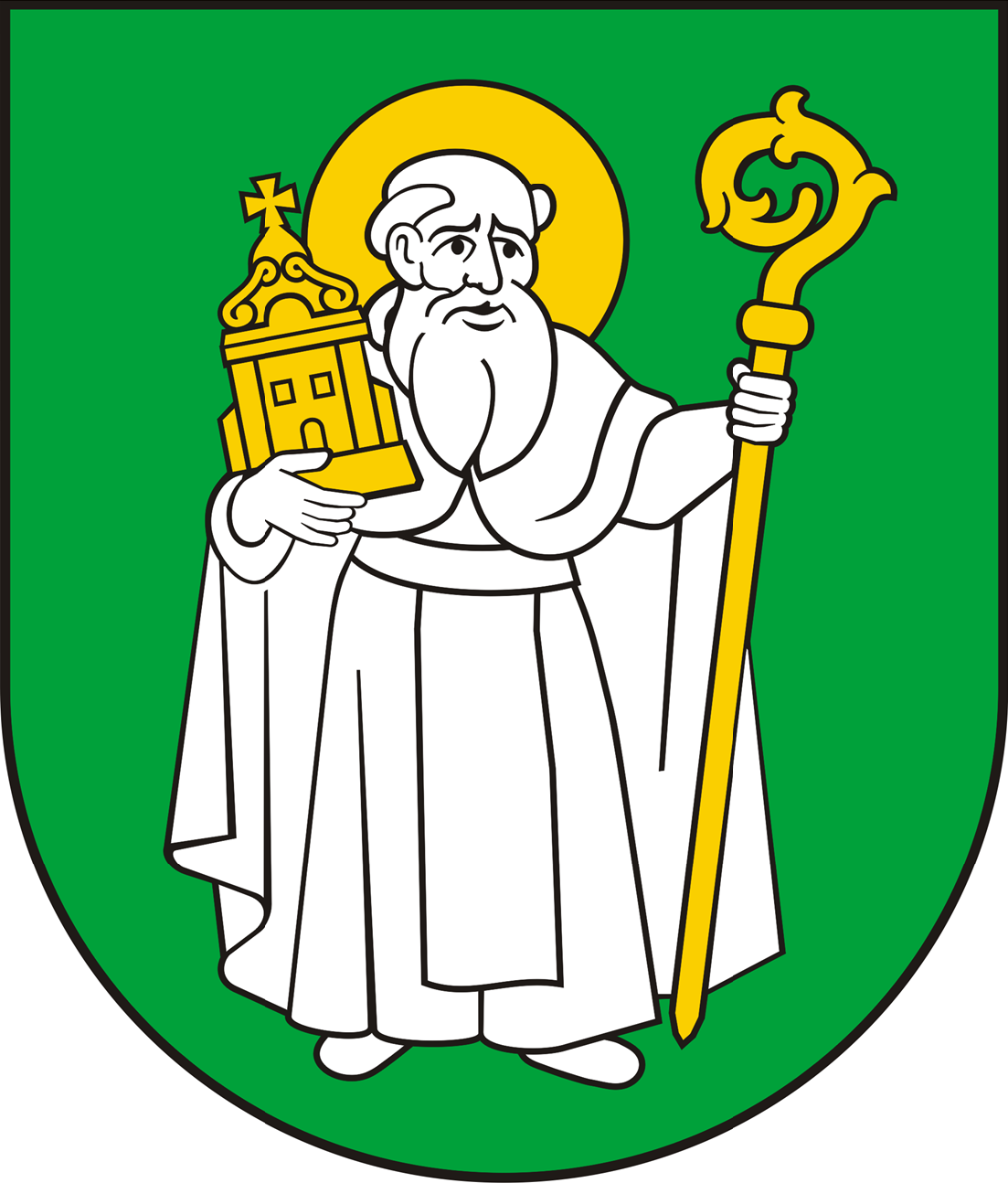 Herb gminy Suwałki.